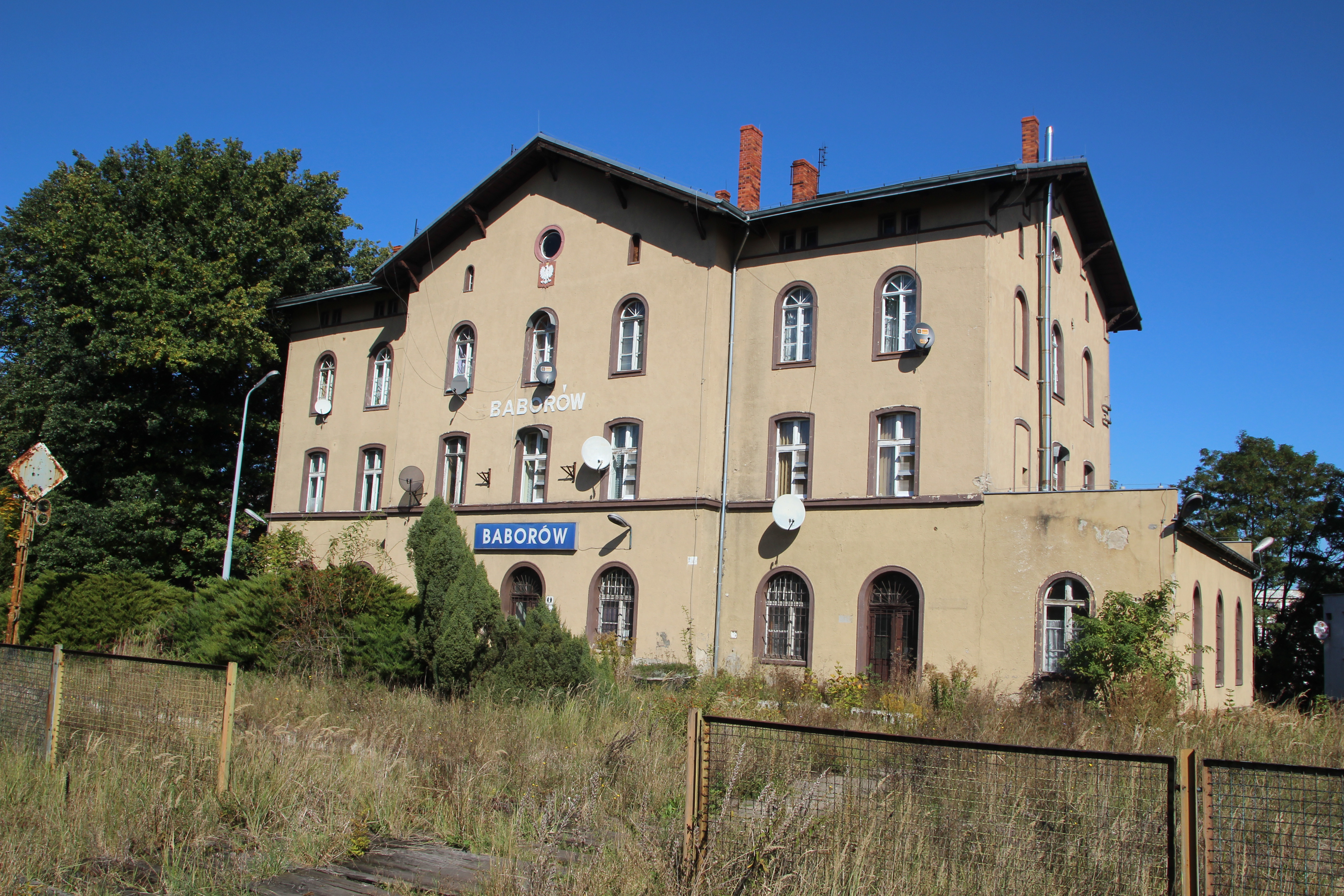 Baborów - wieś w Polsce położona w województwie opolskim, w powiecie głubczyckim, w gminie Baborów.